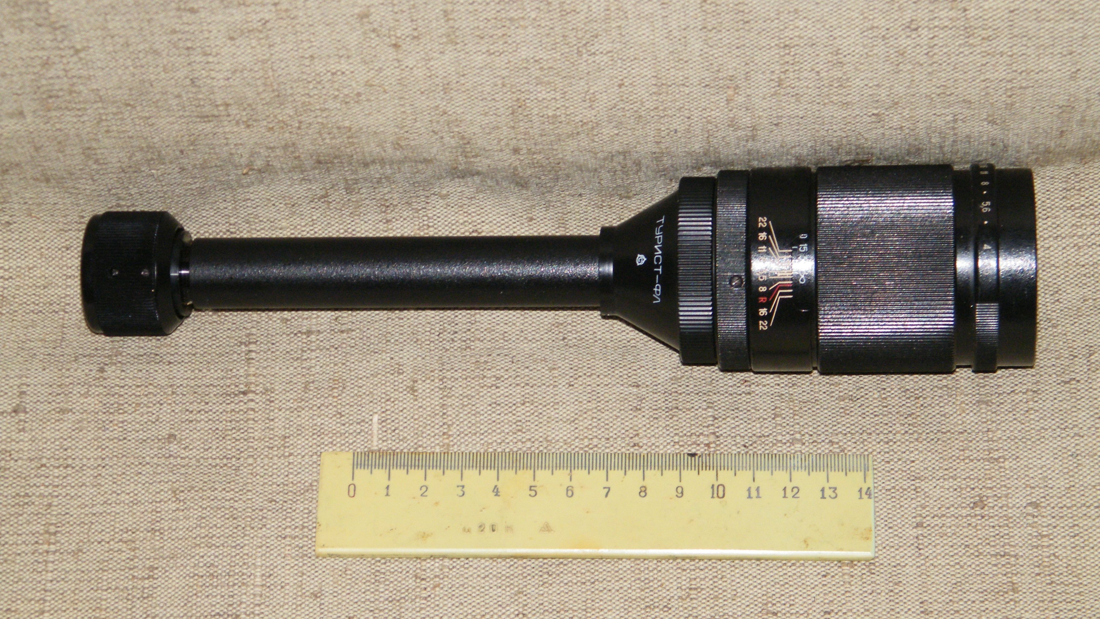 Насадка окулярная "Турист-ФЛ" с объективом "Юпитер-37А"